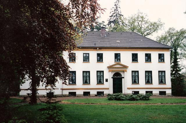 Herrenhaus des adeligen Gutes Krummbek, Gemeinde Lasbek, Kreis Stormarn.